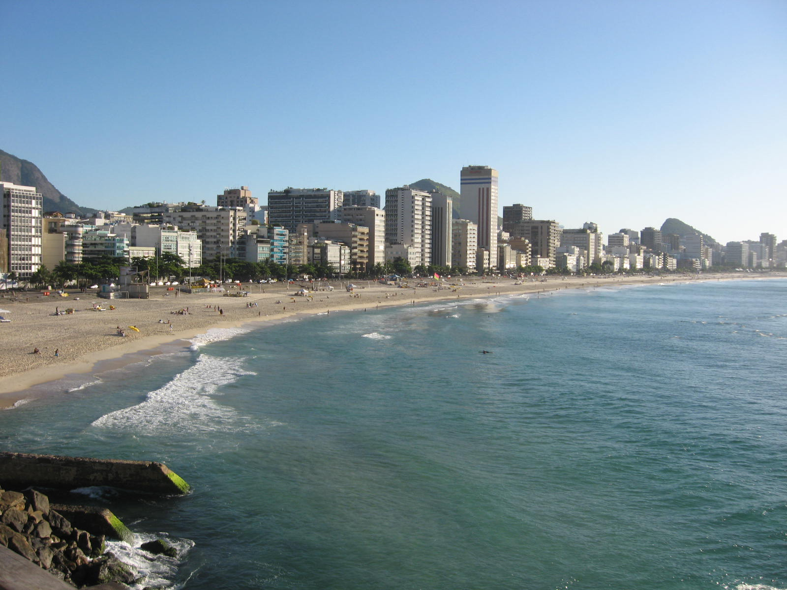 Vista da praia do Leblon, na zona sul da cidade do Rio de Janeiro.